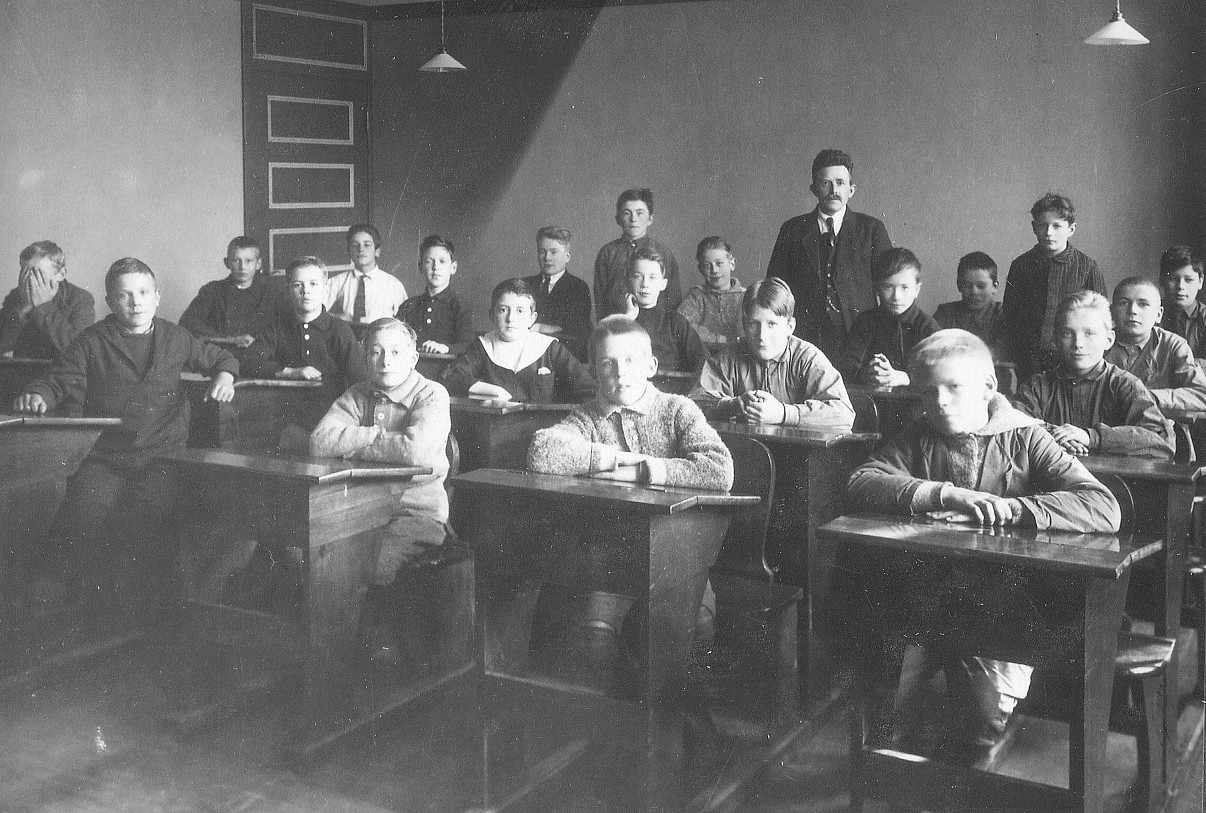 Enskede folkskola, skolklass 1921-1922. Läraren var f.d. riksdagsman Johan Björling